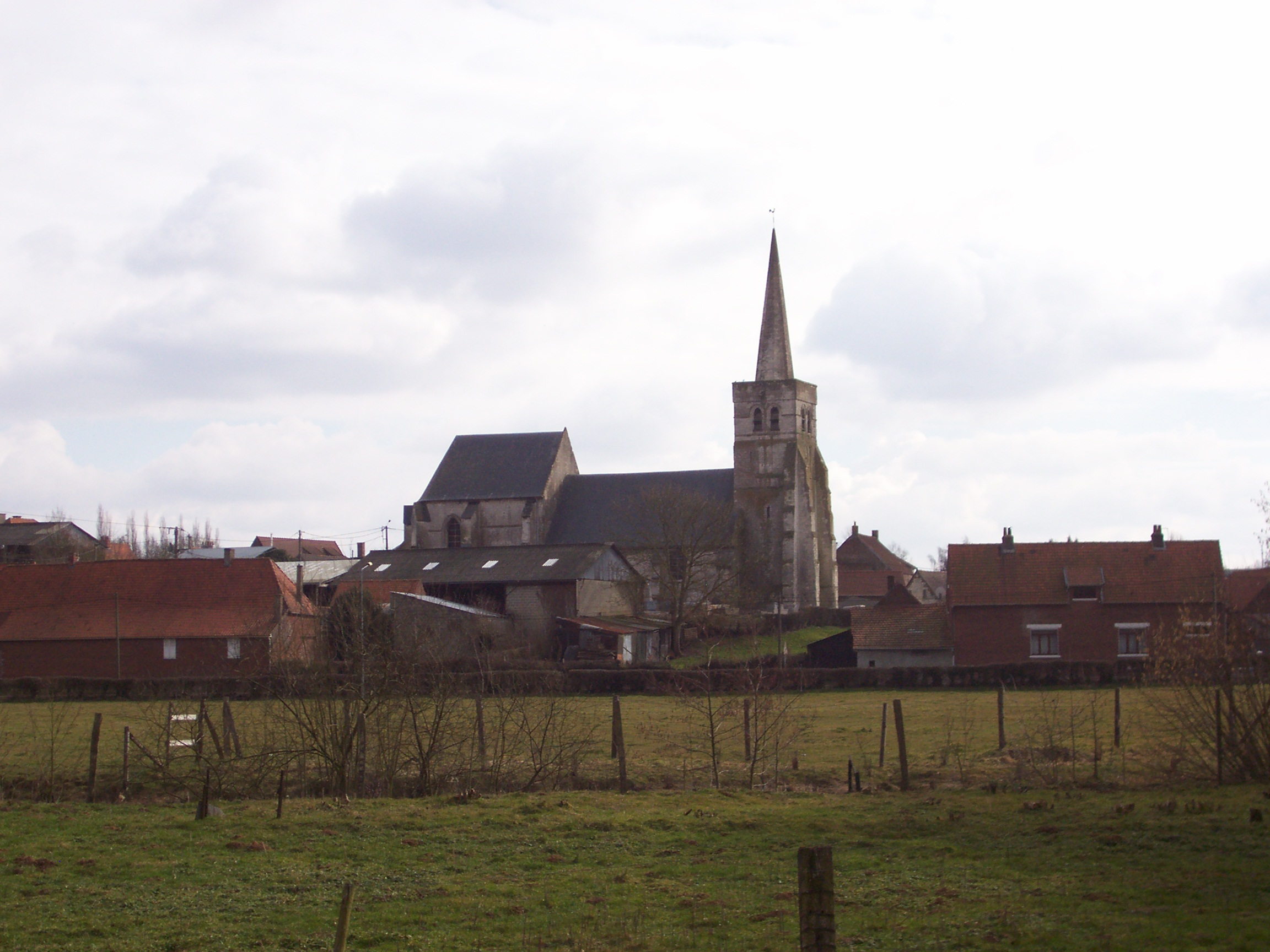 Église de Wavrans-sur-l'Aa et prairie humide, Pas-de-Calais, France